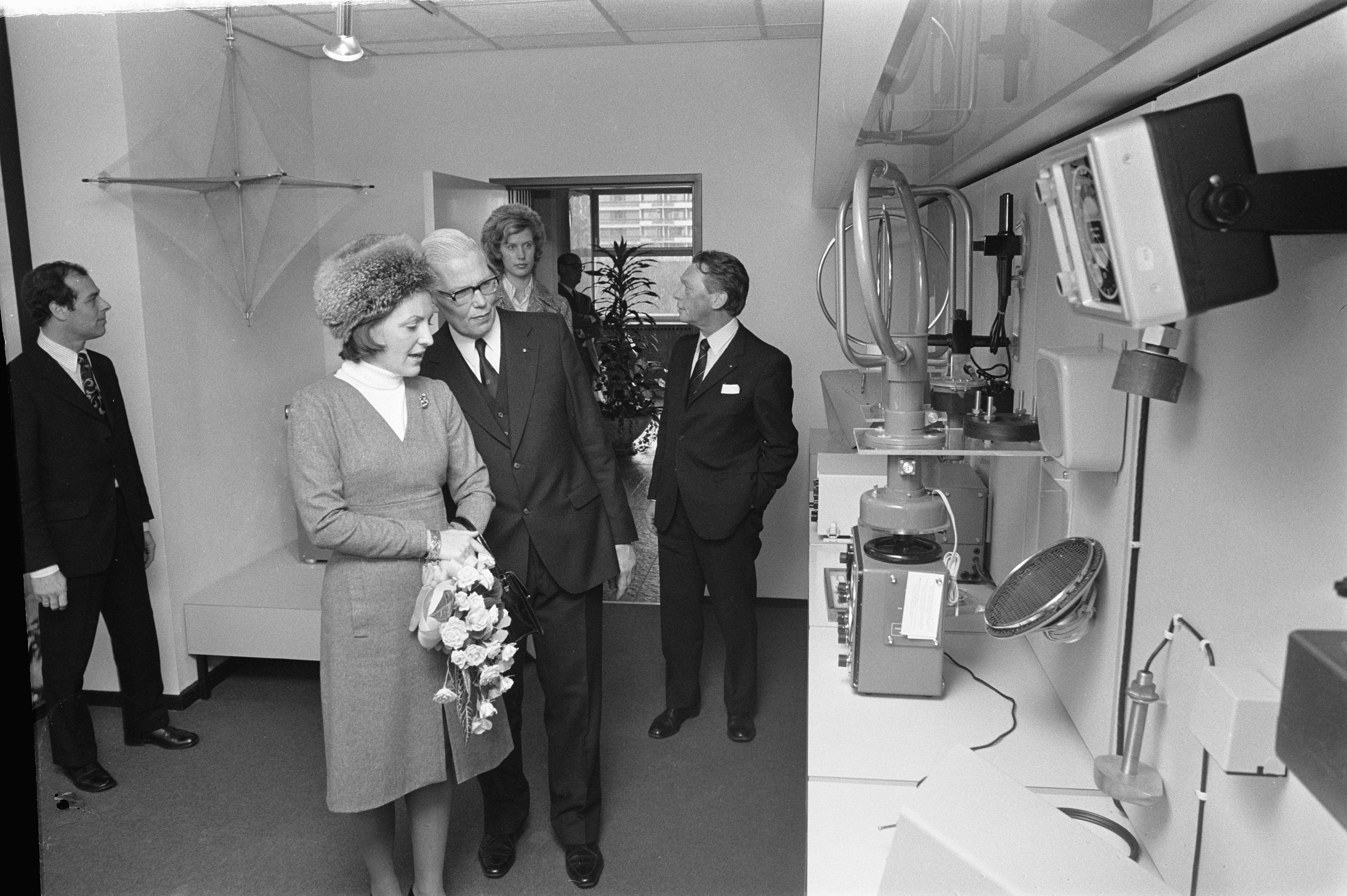 Collectie / Archief : Fotocollectie Anefo Reportage / Serie : [ onbekend ] Beschrijving : Prinses Margriet opent nieuw hoofdkantoor van Radio-Holland in Amsterdam Datum : 13 november 1972 Locatie : Amsterdam, Noord-Holland Trefwoorden : hoofdkantoren, openingen Persoonsnaam : Margriet, prinses Instellingsnaam : Radio Holland Fotograaf : Verhoeff, Bert / Anefo Auteursrechthebbende : Nationaal Archief Materiaalsoort : Negatief (zwart/wit) Nummer archiefinventaris : bekijk toegang 2.24.01.05 Bestanddeelnummer : 926-0206